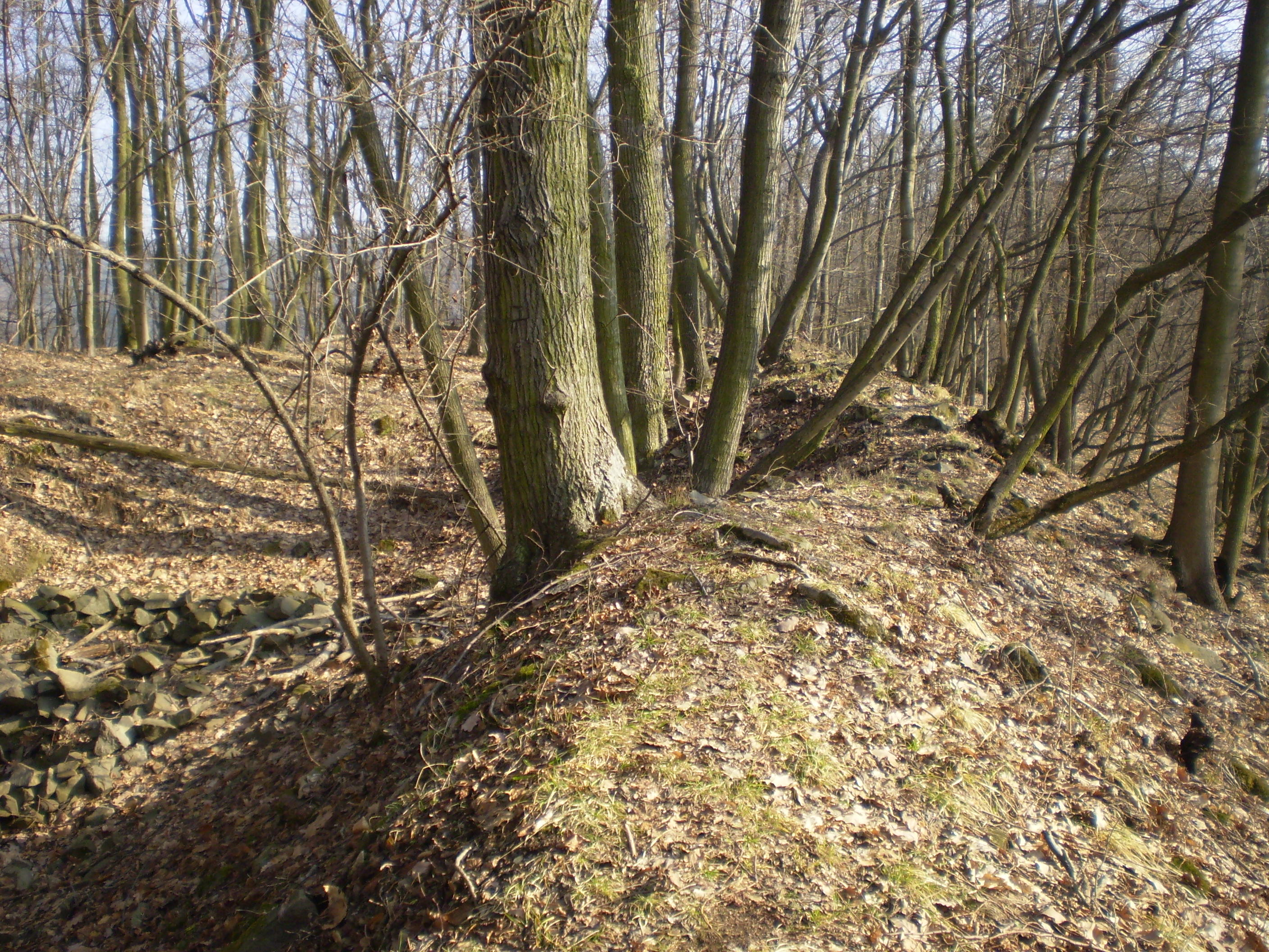 Mokrá-Horákov, zřícenina hradu Horákovského hradu, pozůstatek jižní zdi.